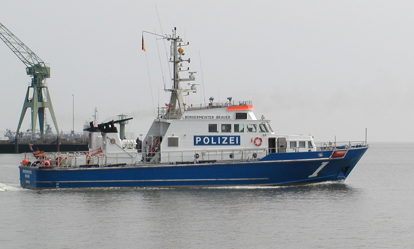 Das Polizeiboot "Bürgermeister Bauer" aus Hamburg